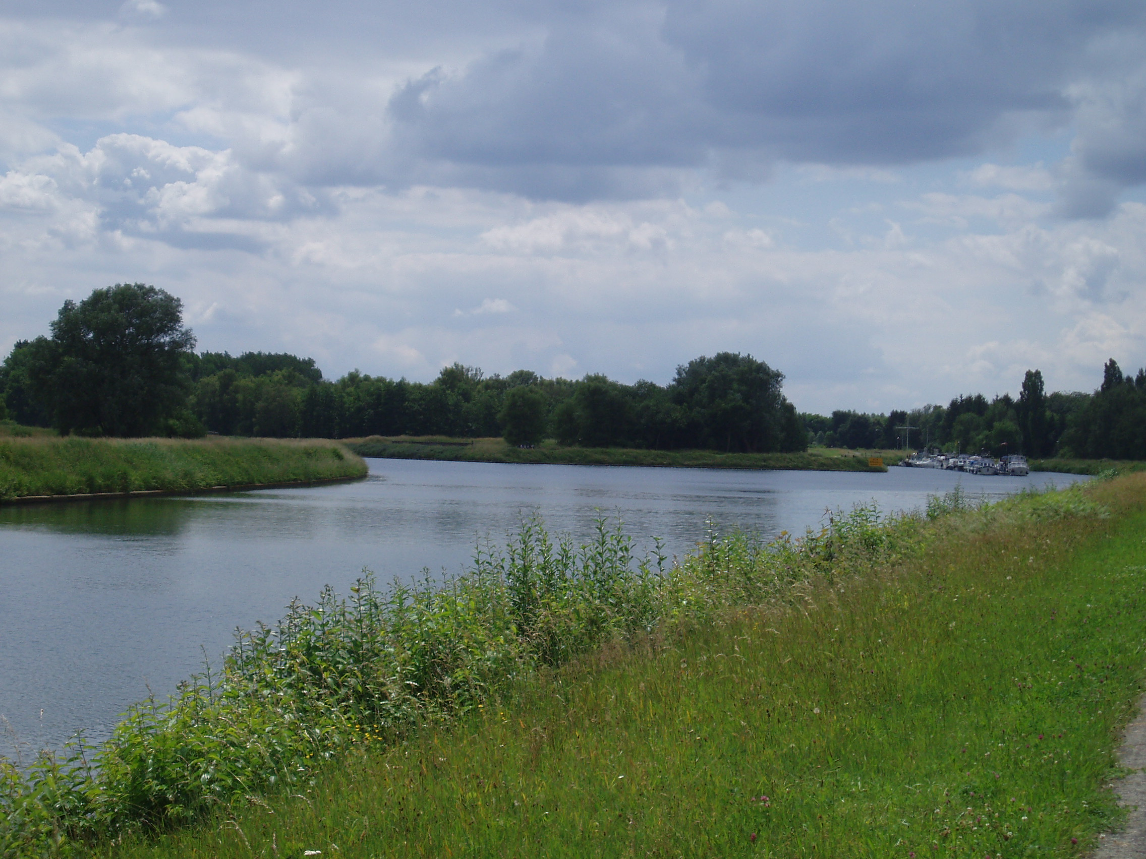 Netekanaal Emblem met jachthaven